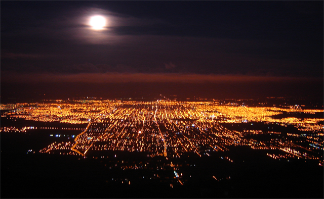 Foto nocturna de S.M. de Tucuman